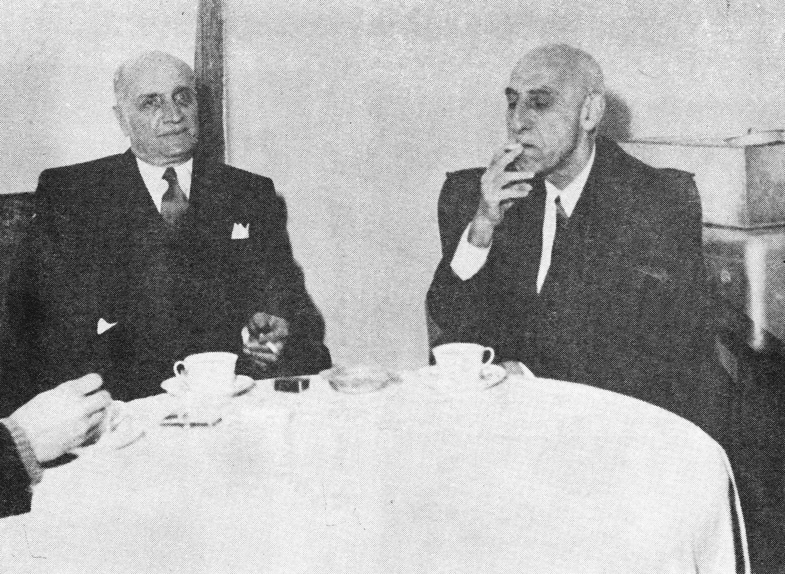 Le premier ministre iranien Mohammad Mossadegh et l'ambassadeur américain en Iran Loy W. Henderson, au début des années 1950.